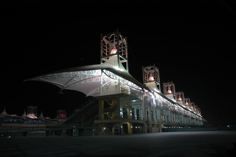 F1 മോട്ടോർസ്പോർട്സ് വേദി, ബഹ്‌റൈൻ